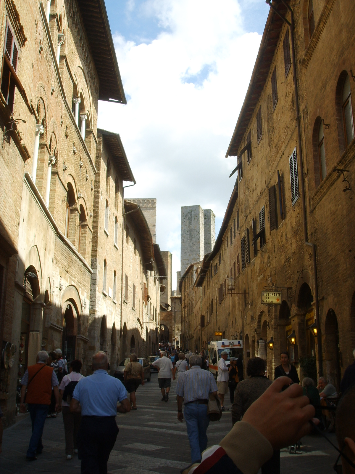 San gimignano via san matteo